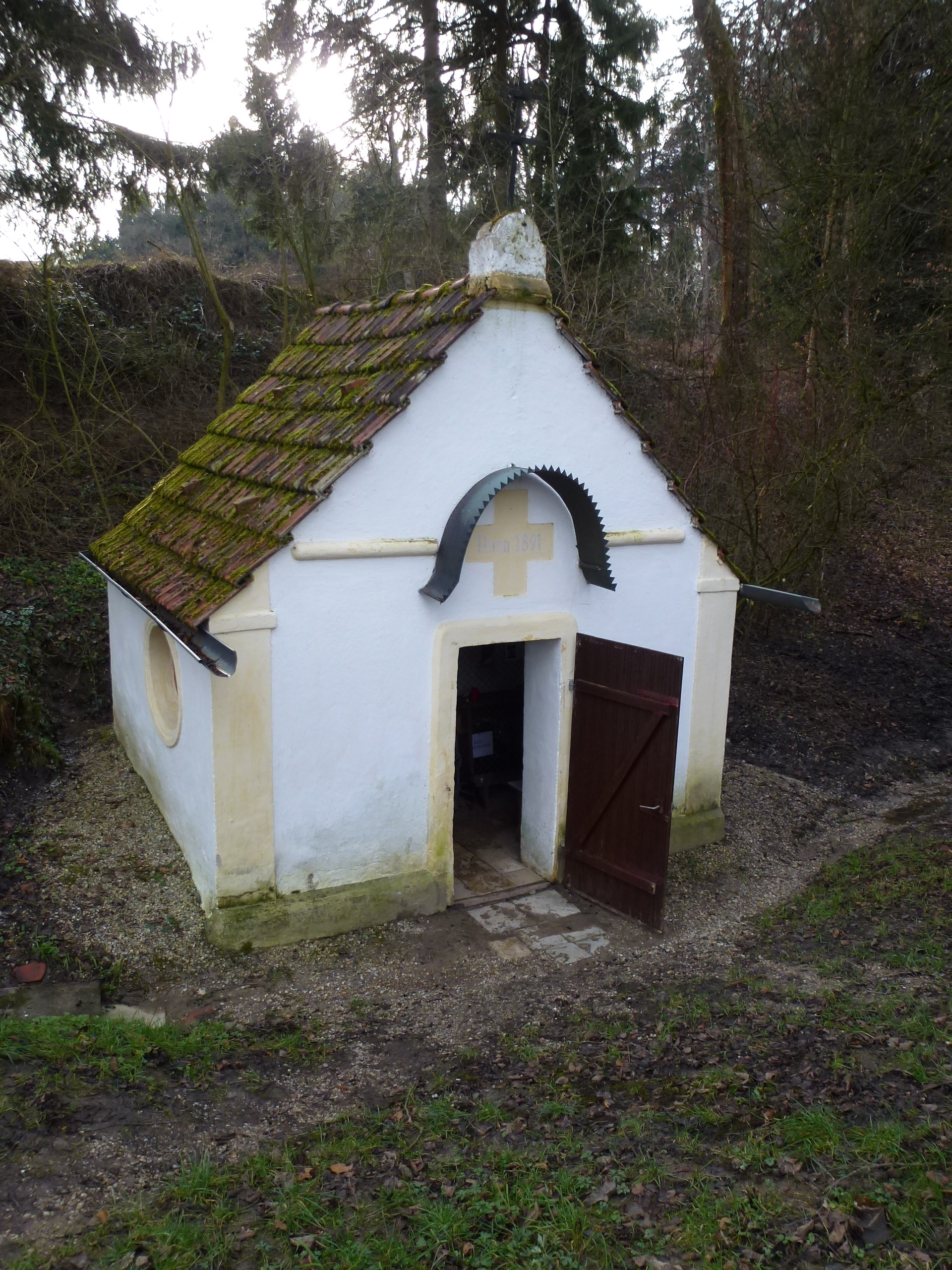 Brunnenkapelle in einem Waldstück zwischen Wagenried und Langenpettenbach. Datumsangabe über dem Eingang: 1891.